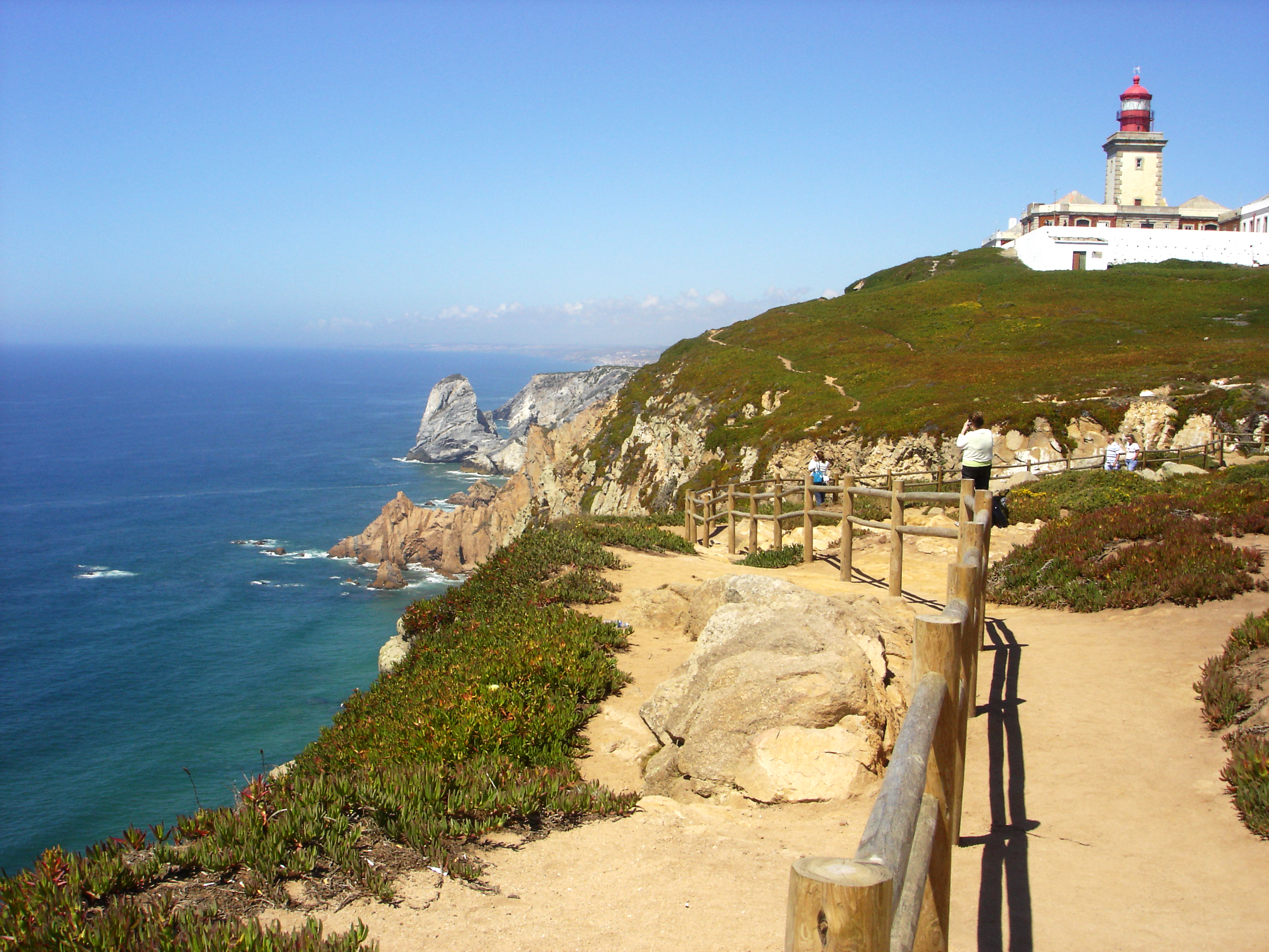 Cabo da Roca